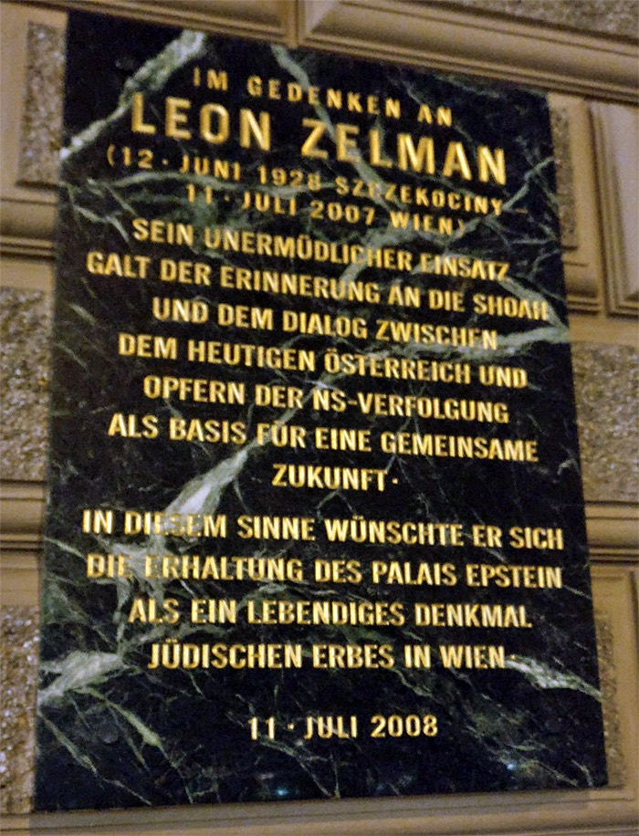 Gedenktalfe für Leon Zelman am Palais Epstein in Wien